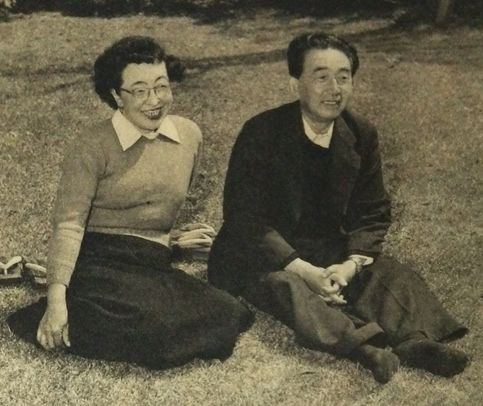 石坂洋次郎・うら夫妻